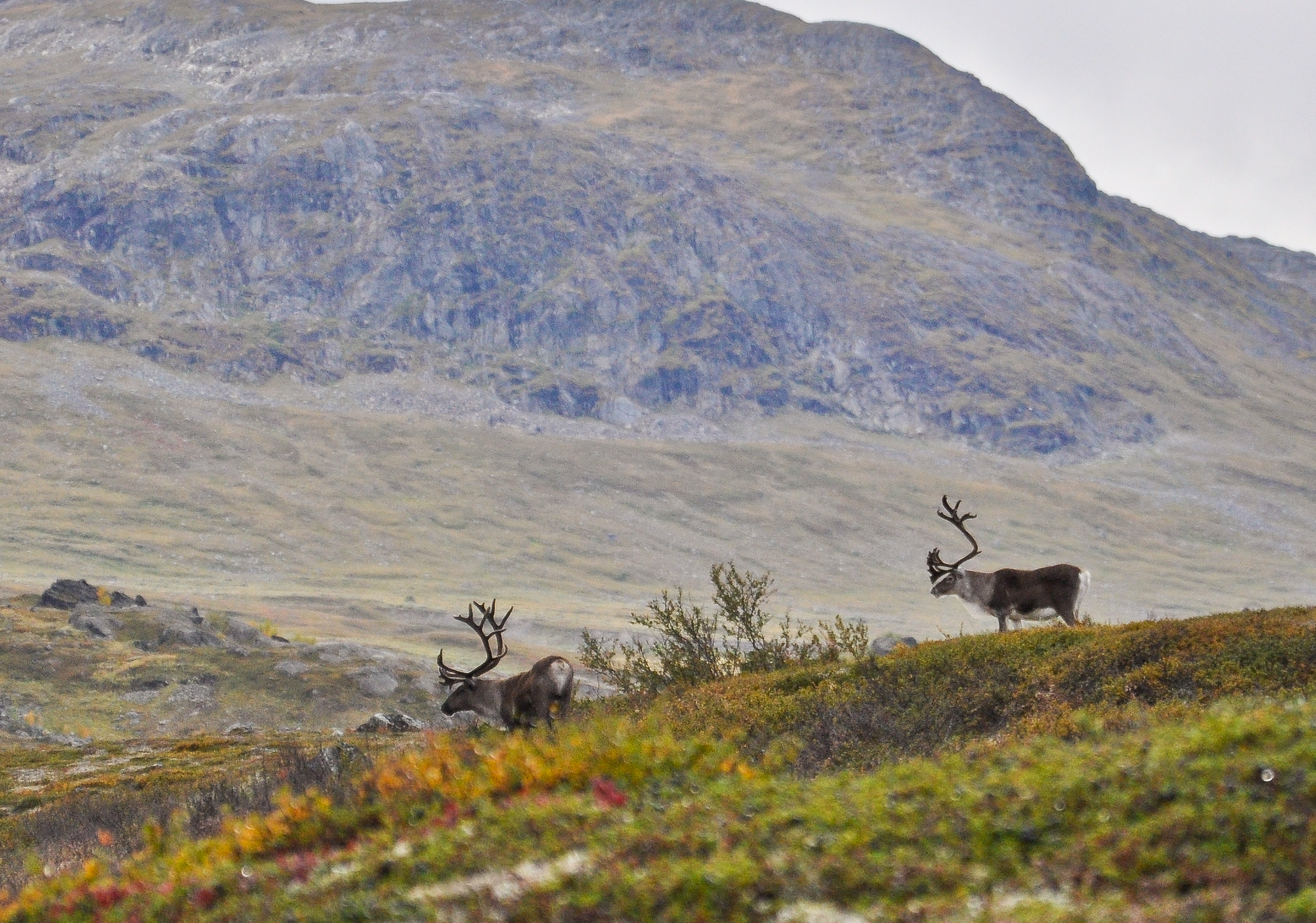 Rentiere vor dem Berg Unna Allagas in Nordschweden (vom Abisko-Nationalpark ausgehend kurz vor Norwegen)